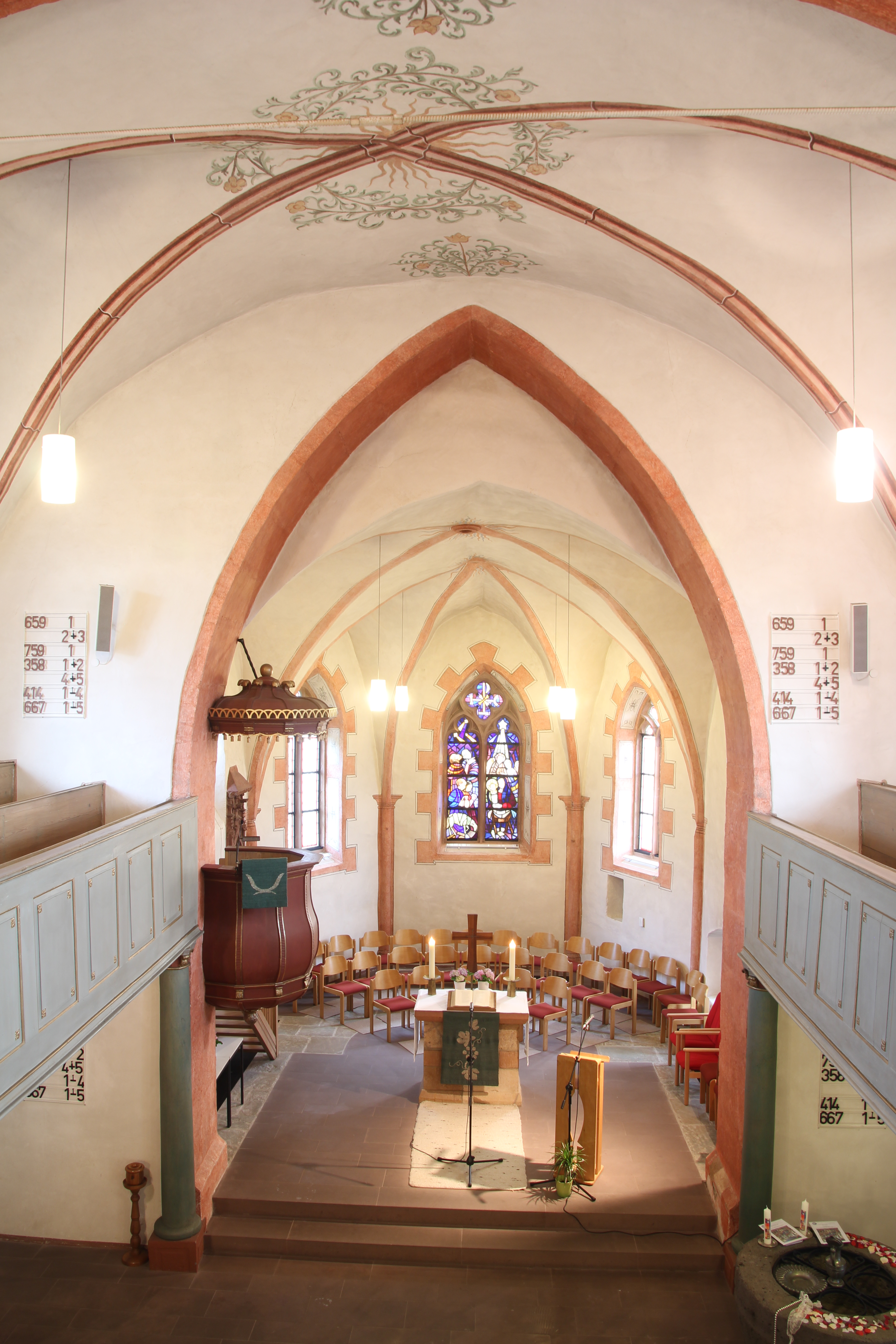 Siehe Bild und Dateiname